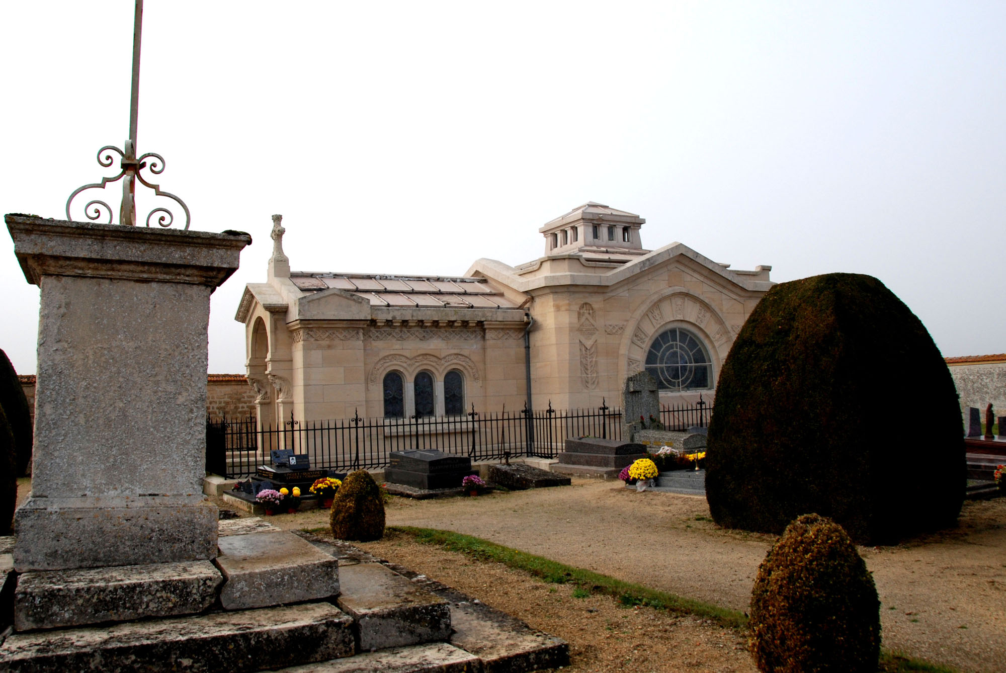 Bourgogne mausoleum - France